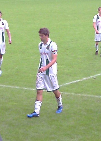 Kees Kwakman bij FC Groningen in 2011.